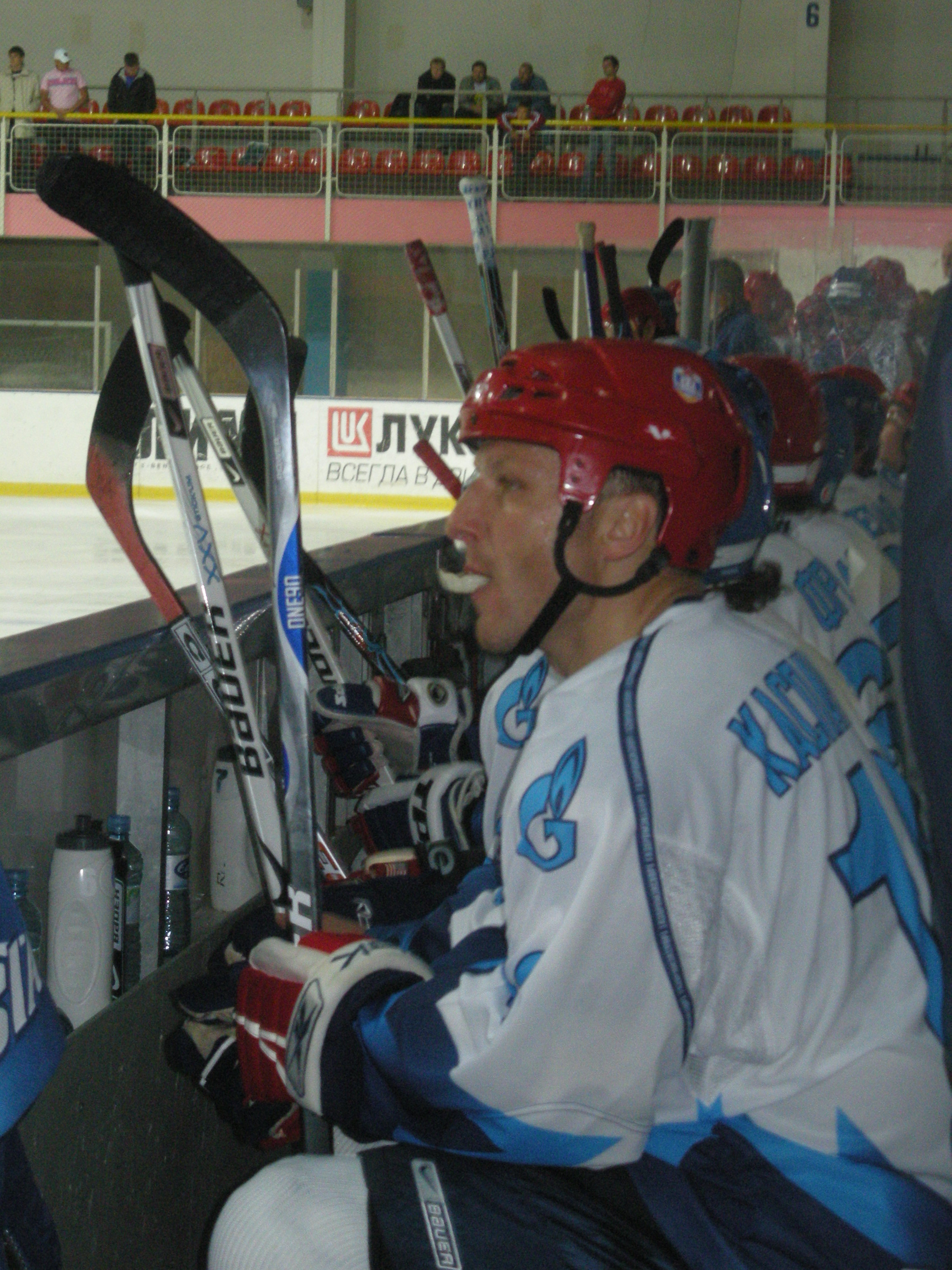 Дарюс Каспарайтис